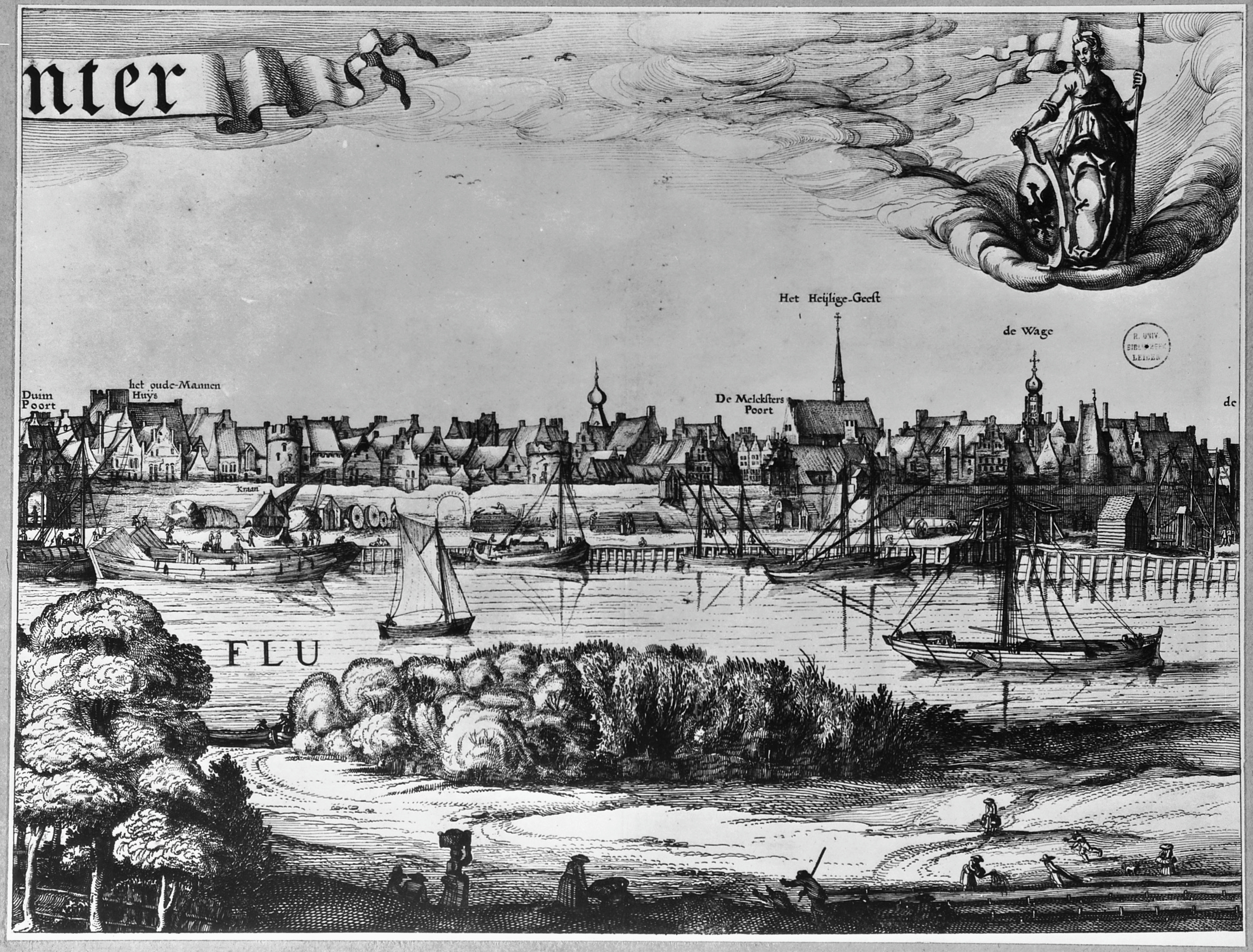 Plattegronden en overzichten: Gezicht op Deventer, Claes Jansz. Visscher 1615